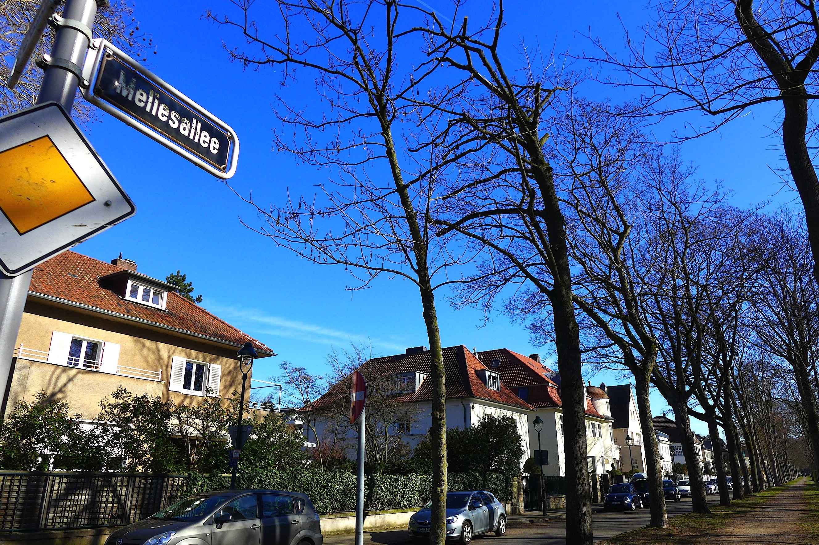 Юлий Мелиc - бургомистр Бенрата 1906-1926. Cкончался в 1948 году.